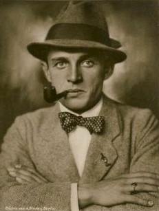 Der deutsche Schauspieler Harry Lamberts-Paulsen